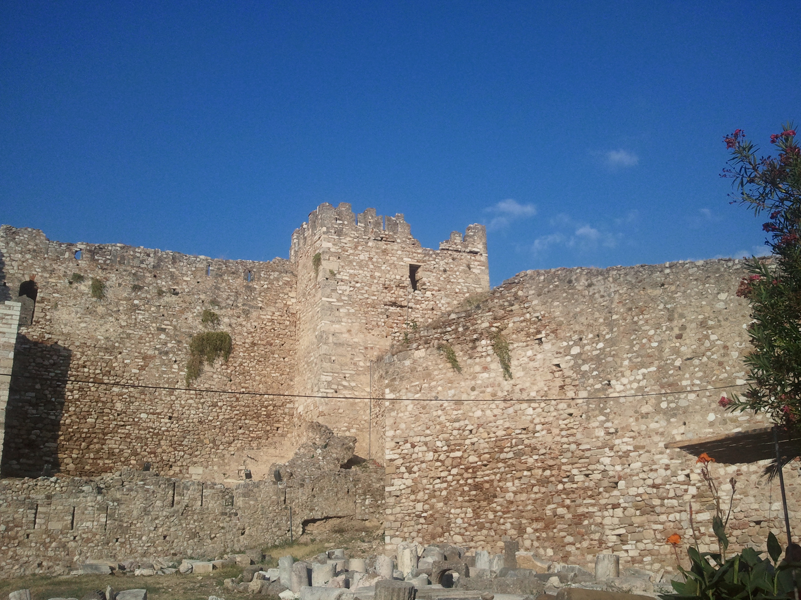 Κάστρο Πάτρας